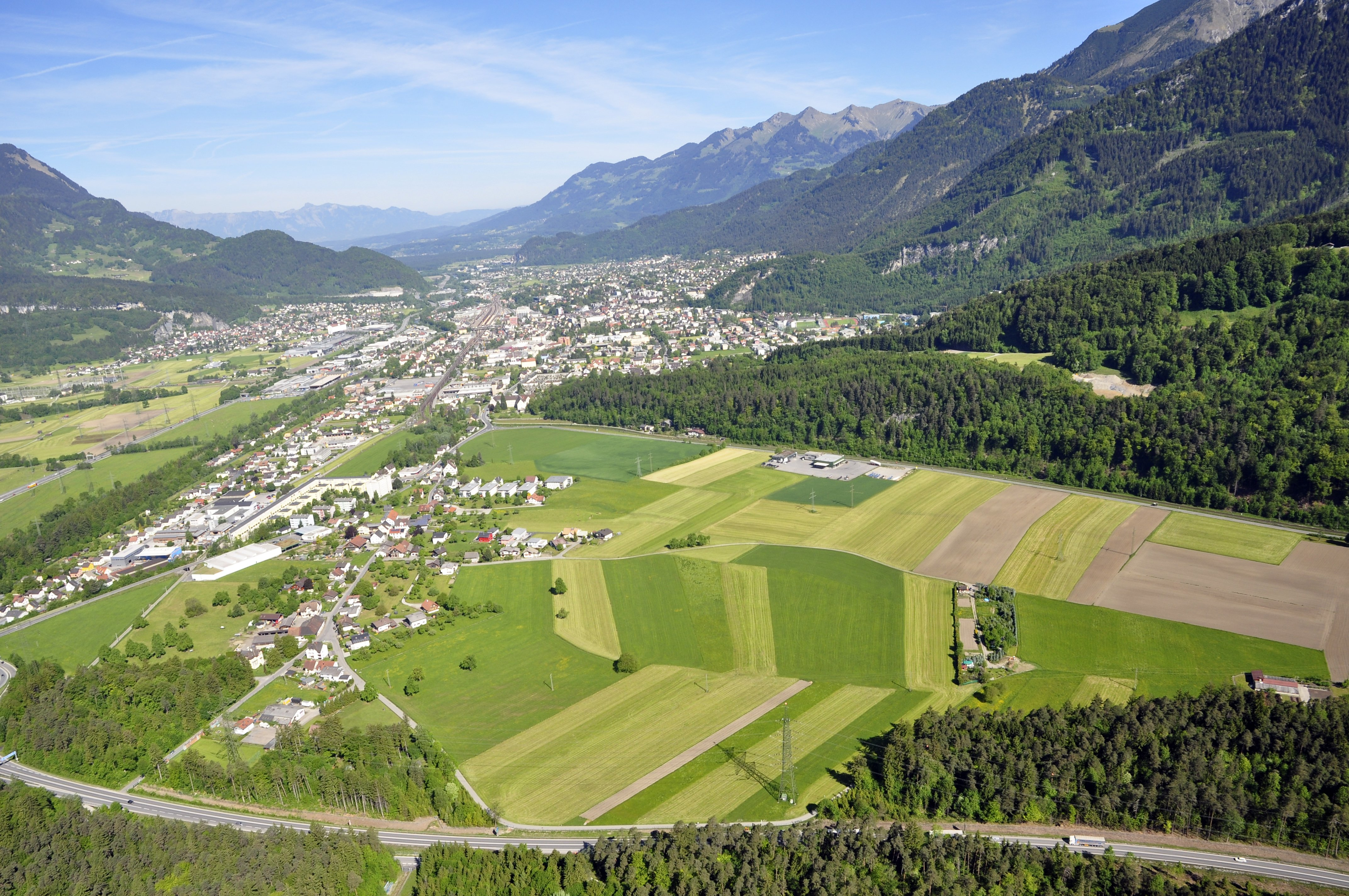 Luftbildaufnahme der österreichischen Stadt Bludenz von Südosten aus gesehen